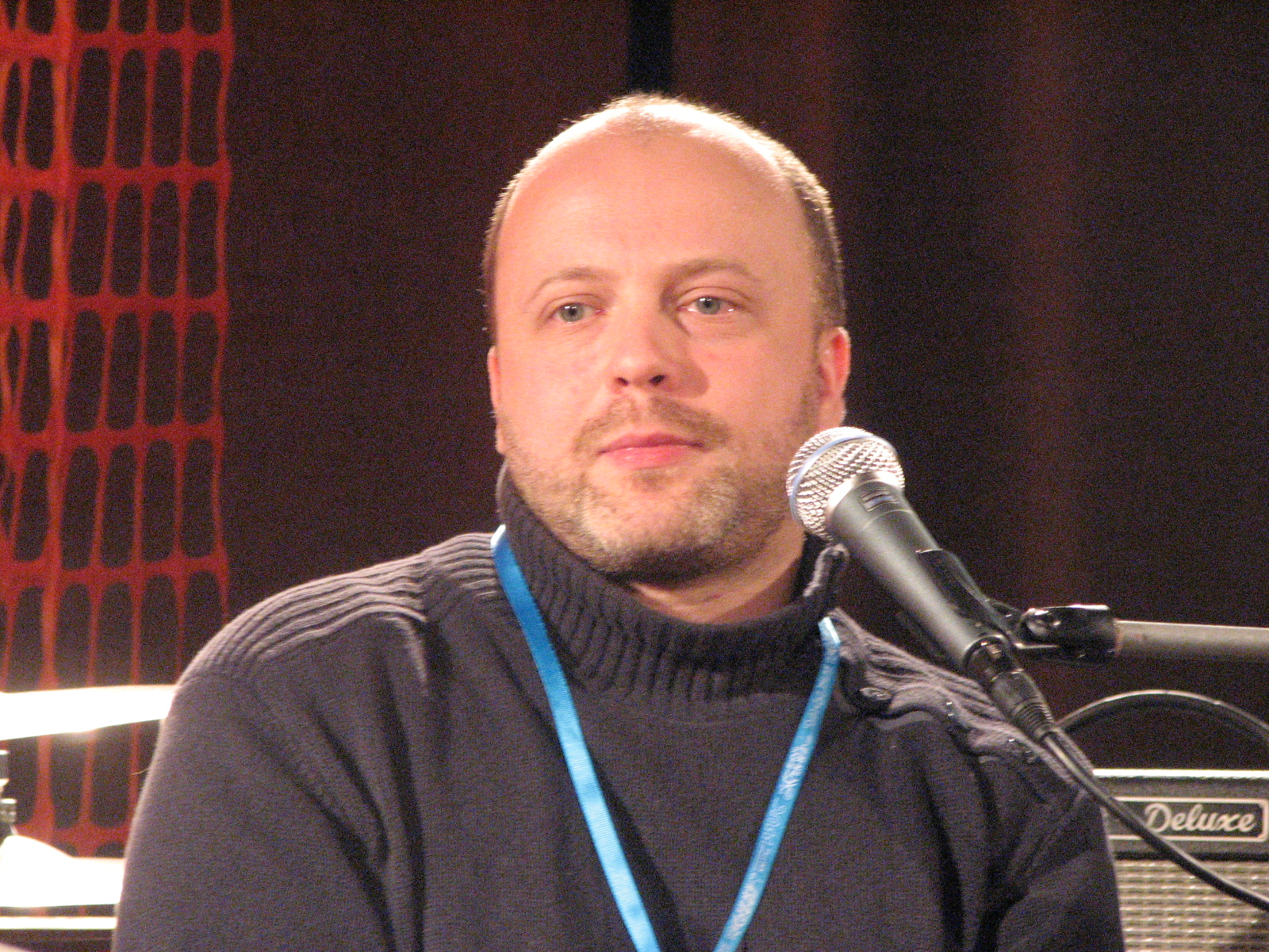 P.I. Filimonov esinemas kirjandusfestivalil HeadRead 2011